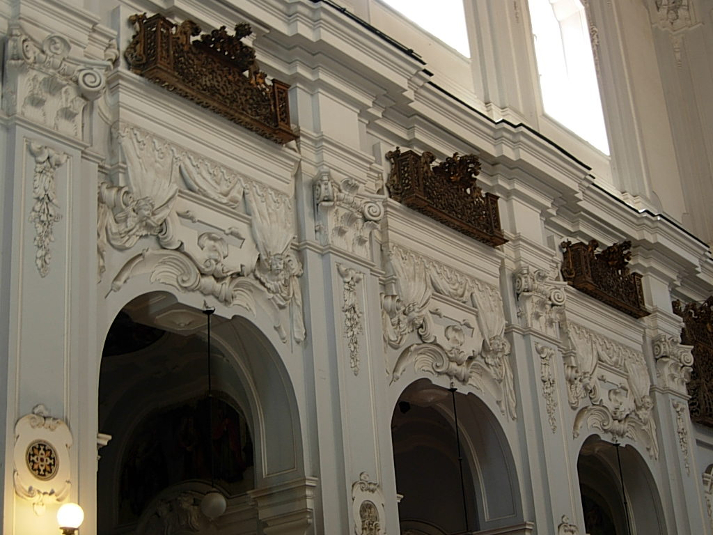 Chiesa di Santa Maria di Costantinopoli in Napoli Foto prsonale concessa in PD